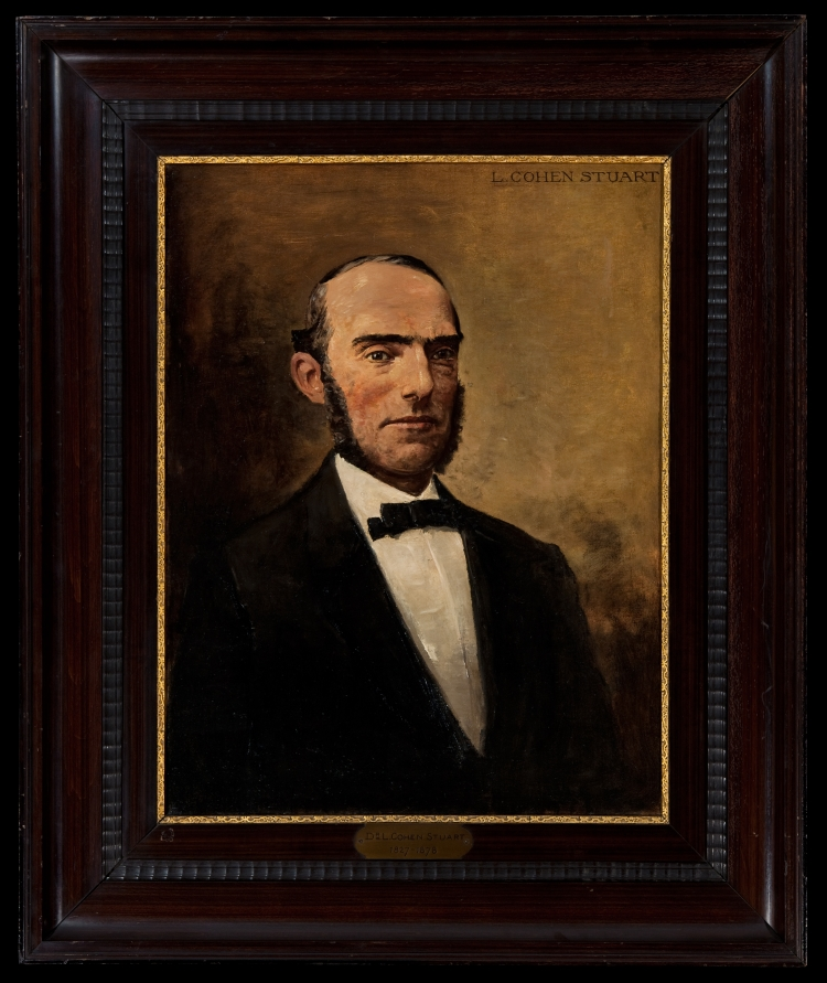 Geschilderd portret van L. Cohen Stuart, hoogleraar wiskunde en geodesie, directeur der Polytechnische School (1864-1878). Location 2017: IHE, Delft